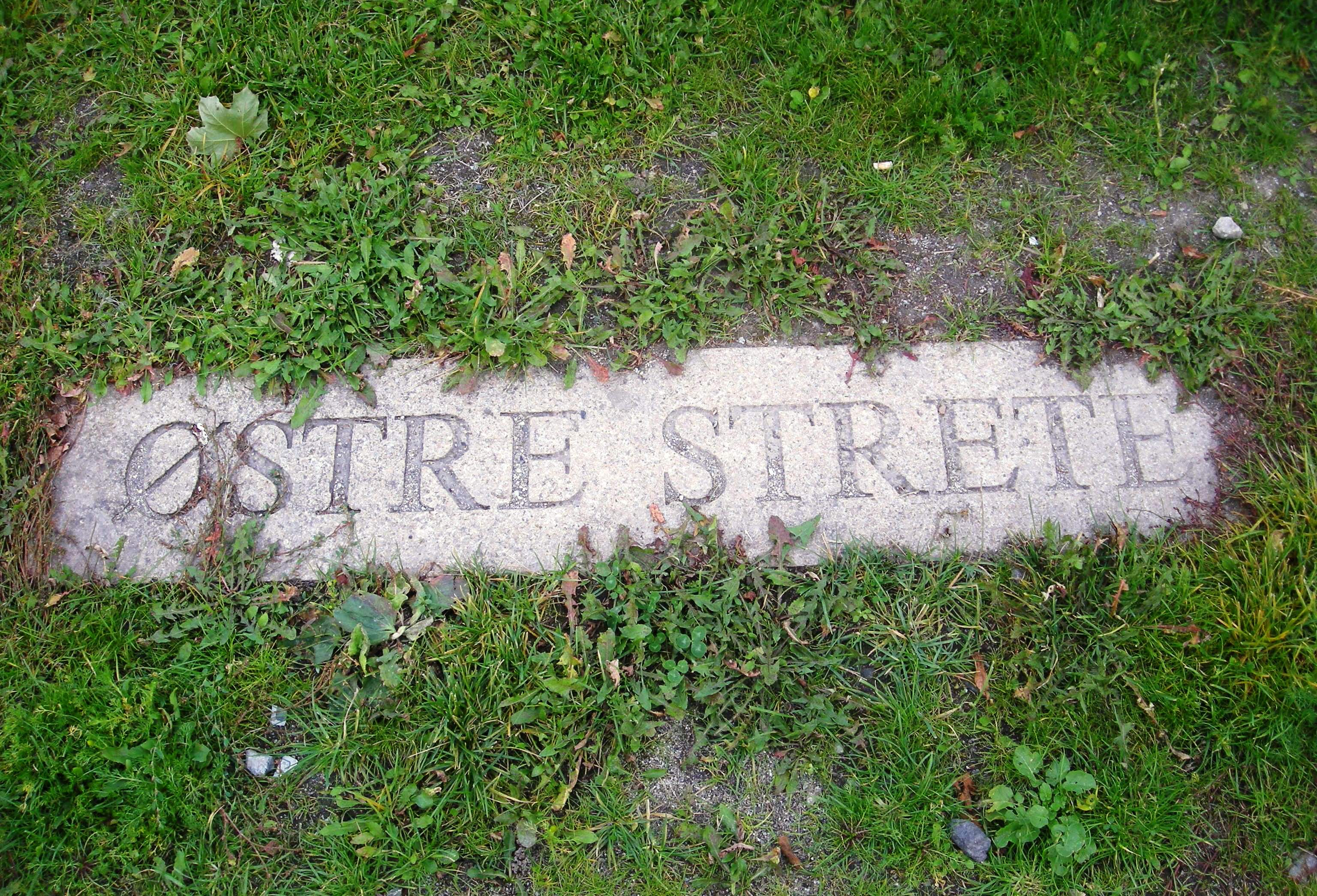 Østre strete: Minne om gammelt gatenavn i Gamlebyen i Oslo